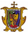 Escudo del municipio de Sutatausa, Cundinamarca, Colombia